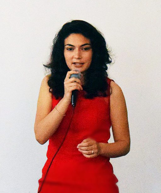 Таня Мир на представянето на книгата й "Легенди от Белинташ" в София.